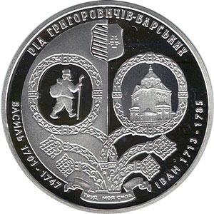 срібна монета Родина Григоровичів-Барських реверс